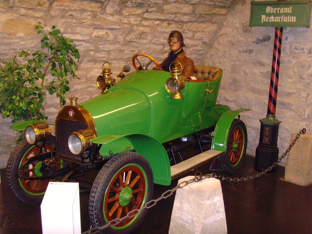 1232 ccm, Reihen-Vierzylinder, 15 PS, 60 km/h. Deutsches Zweirad- und NSU-Museum Neckarsulm.